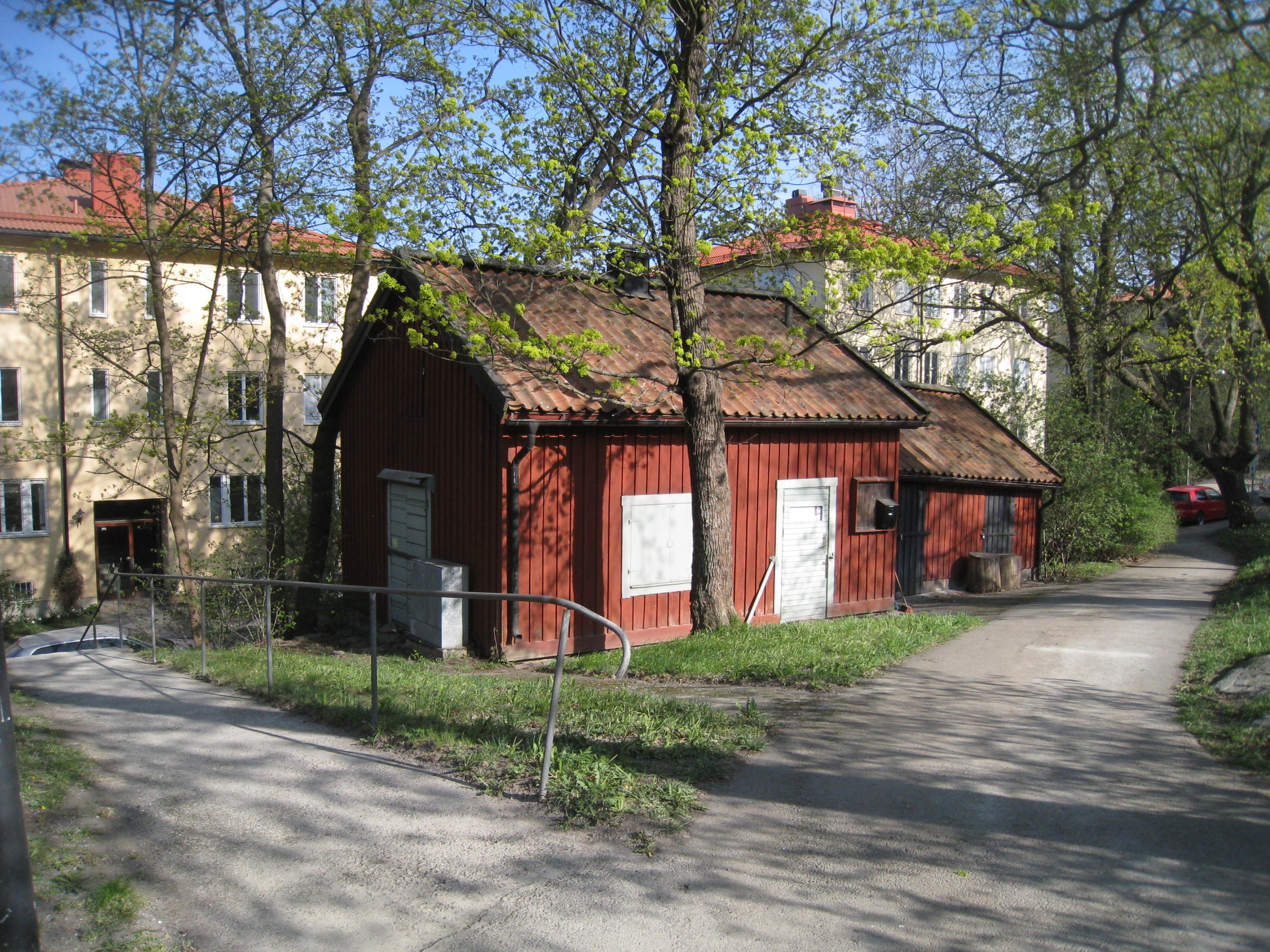 Tranebergs gård, Bromma, Stockholm, mangelbod och vedbod.